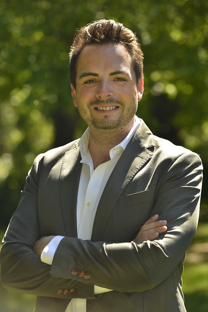 Álvaro Aguirre durante la campaña electoral de 2019